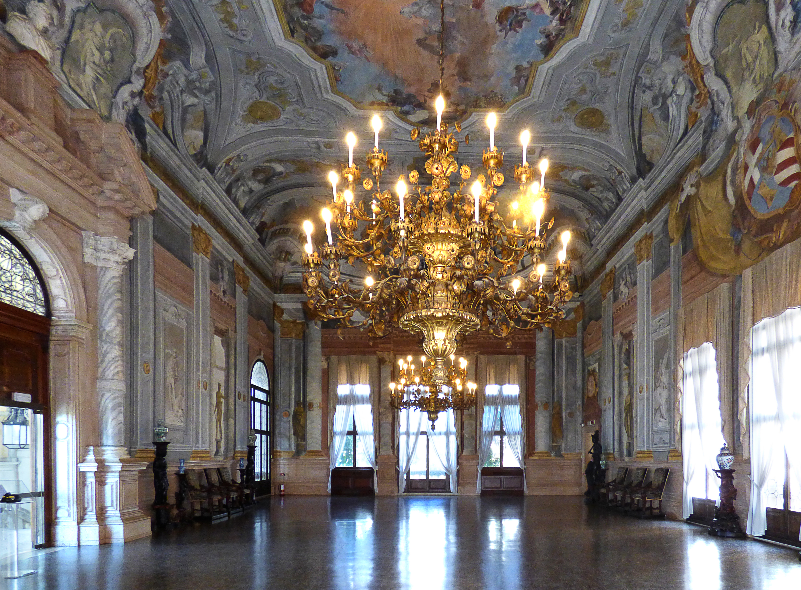 Sala da ballo di Cà Rezzonico